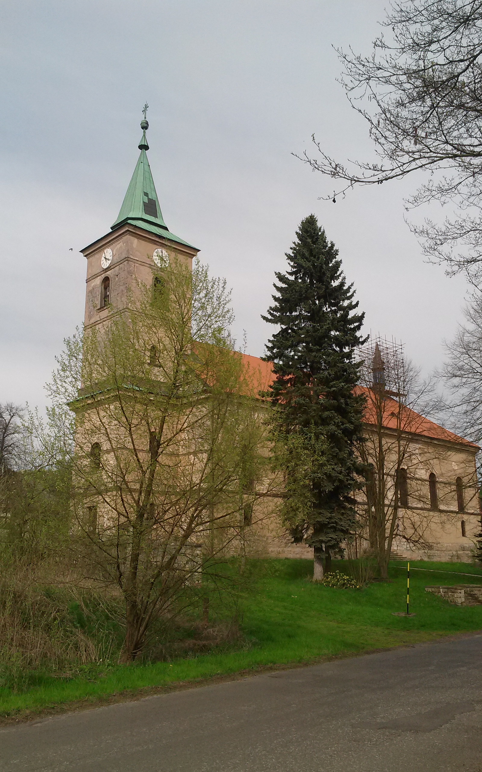 Kostel sv. Mikuláše (Horní Brusnice), Horní Brusnice